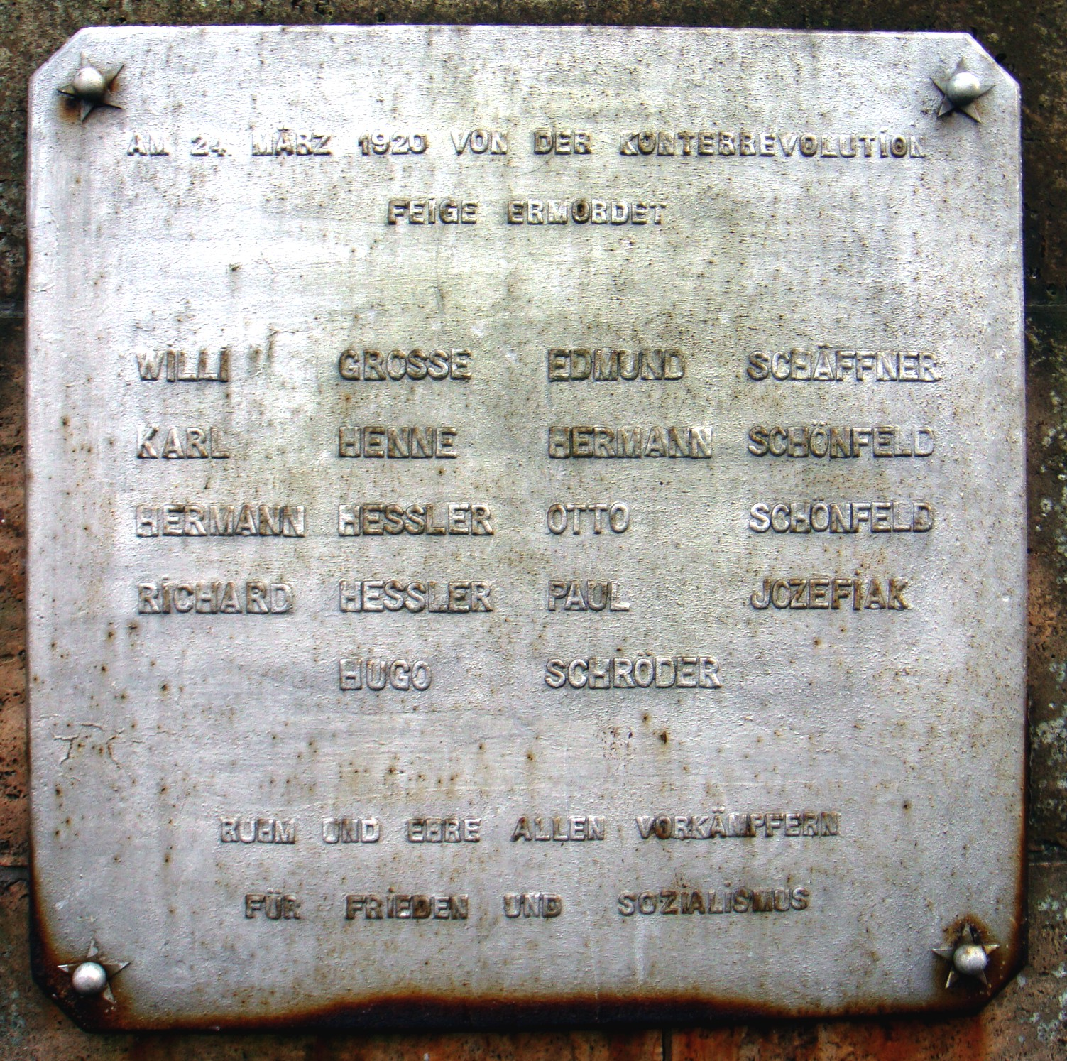 Gedenktafel der Märzgefallenen